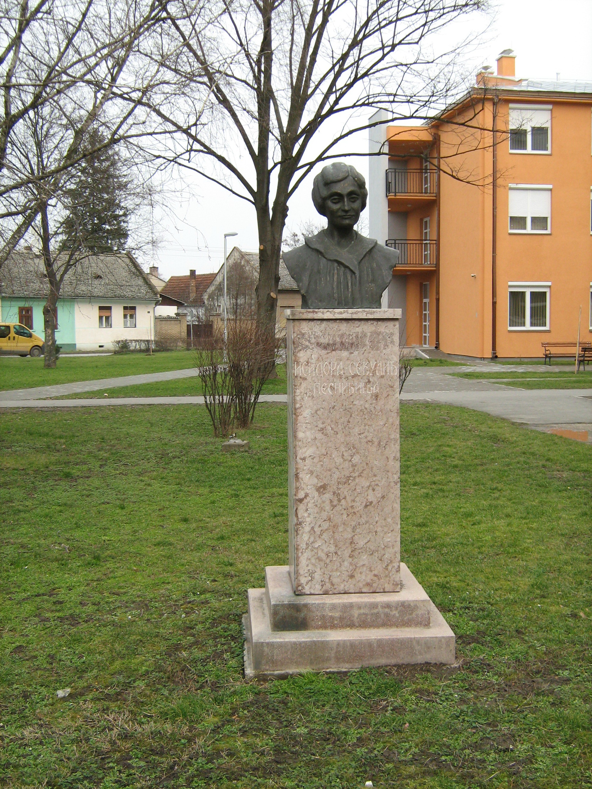 Споменик Исидори Секулић у Сомбору испред Педагошког факултета